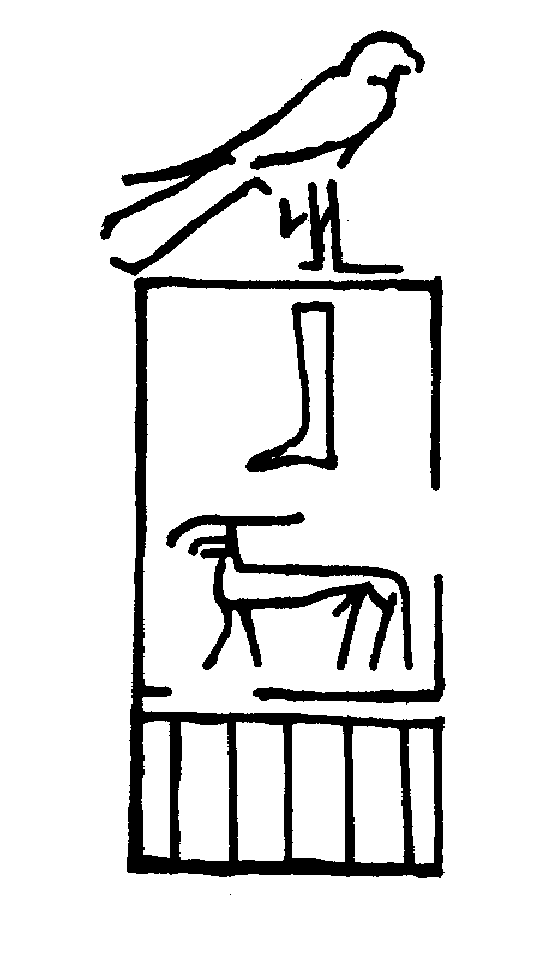 König Ba (Horus Ba)